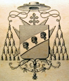 Stemma raffigurato in una litografia del card. Morichini (firmata F.lli Pieroni, Ancona, 1856)